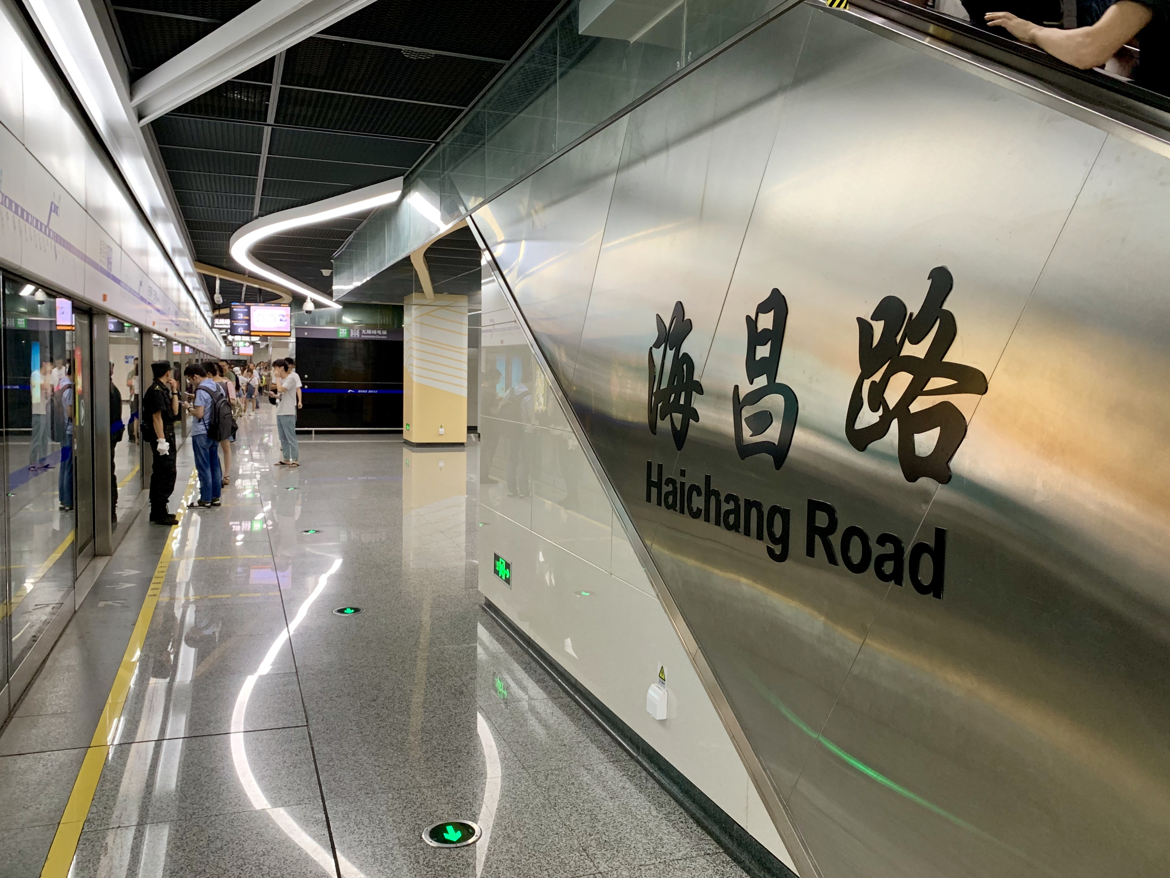 成都地铁海昌路站